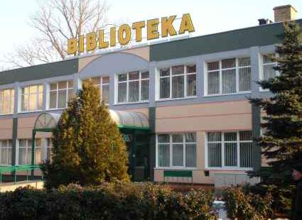 Biblioteka miejska w Słubicach, ul. Jedności Robotniczej 18.